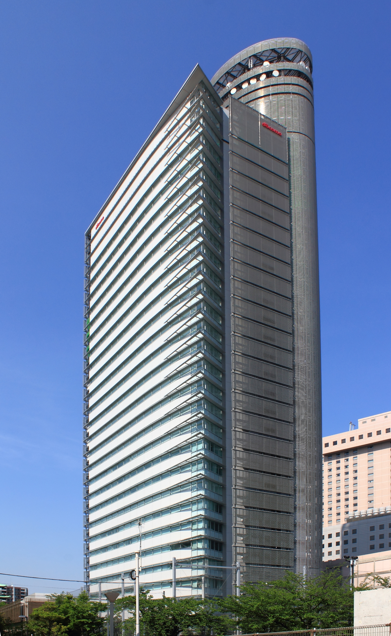 NTTドコモ墨田ビル（東京都墨田区）